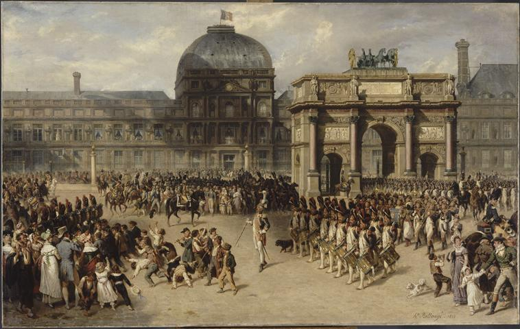 Une revue militaire devant l'arc du Carrousel aux Tuileries sous l'Empire (1810)